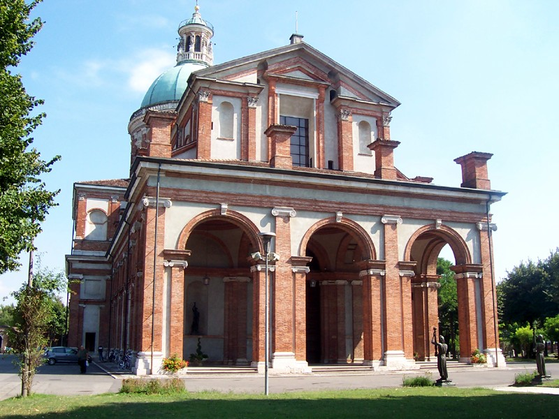 Caravaggio - Santuario della B.V. Maria